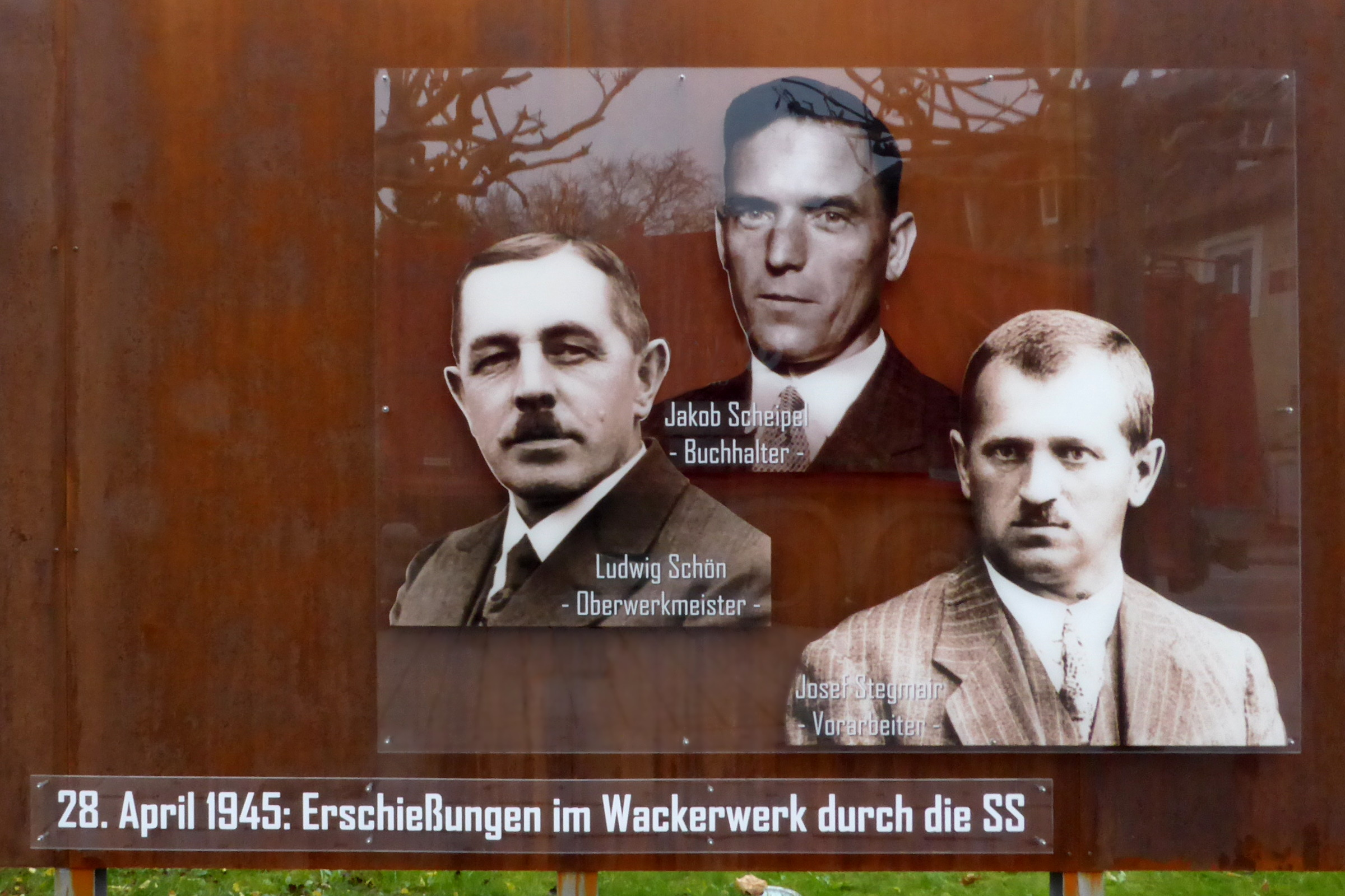 Teil des Mahnmals in Burghausen für Jakob Scheipel, Ludwig Schön und Josef Stegmair, die am 1945-04-28 von der SS ermordet wurden.